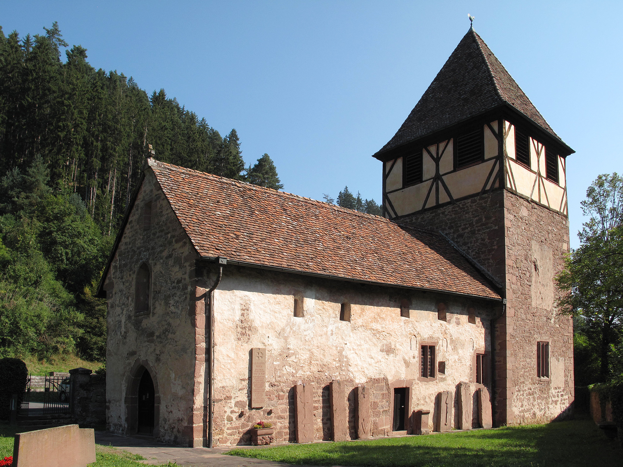 St. Candiduskirche Kentheim, Baden-Württemberg, Bad Teinach-Zavelstein – Ansicht von Südwesten